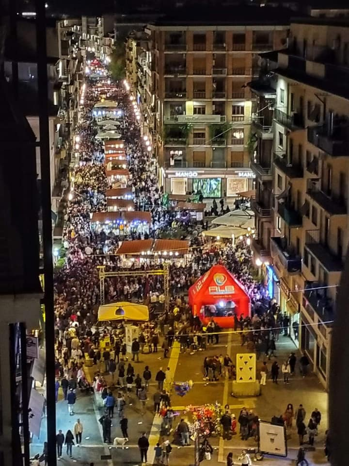 Corso Mazzini a Cosenza fotografato ad ottobre 2019